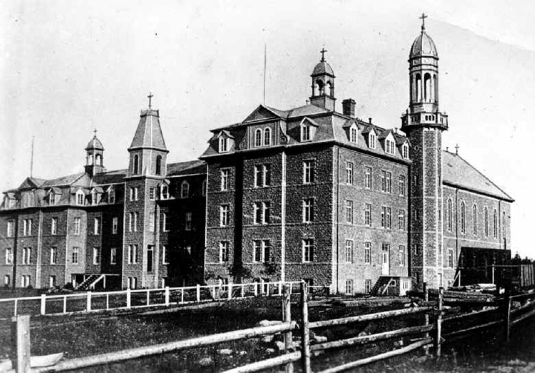 Collège Sacré-Coeur, Caraquet, Nouveau-Brunswick